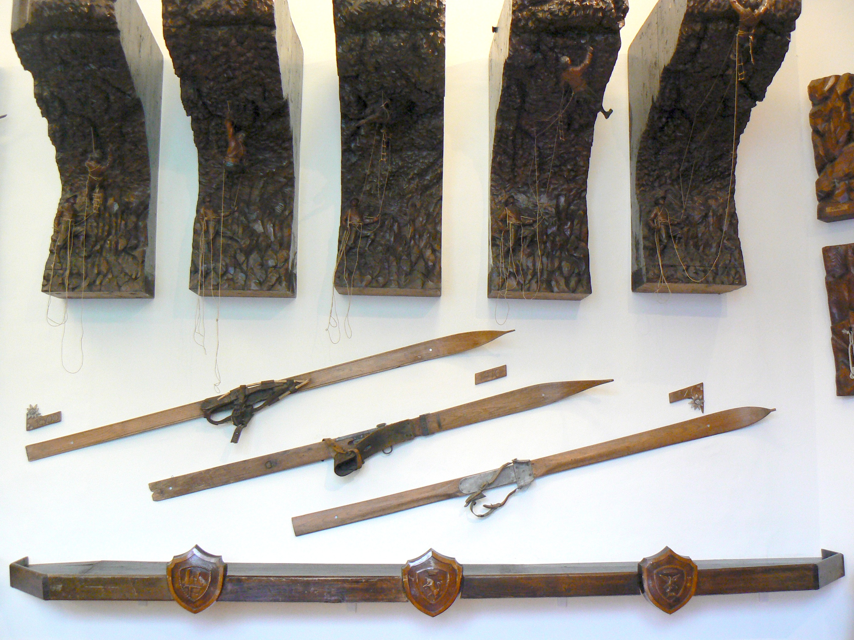 Museo dell'alpinismo del Castello Jocteau, Aosta, Valle d'Aosta, Italia.